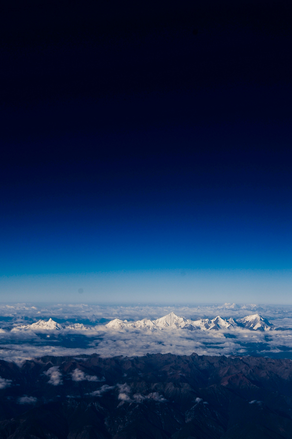 梅里雪山俯瞰